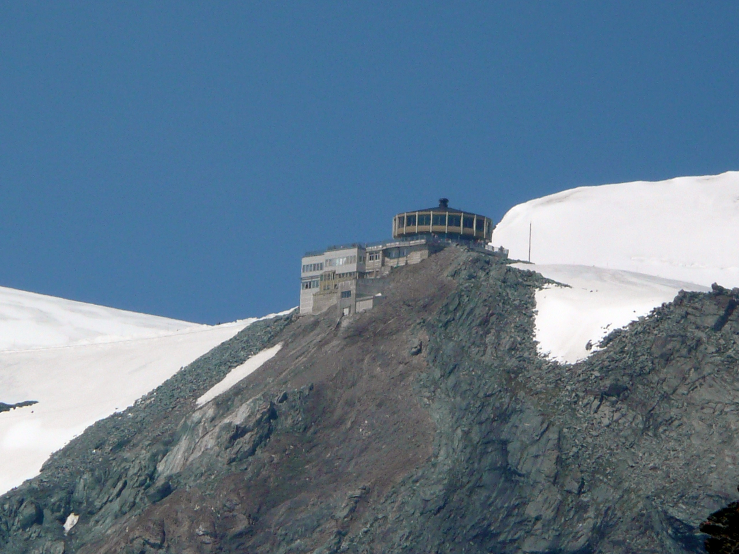 Drehrestaurant Mittelallalin von der Britanniahütte aus gesehen.